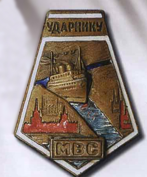 27 января 1934 года Президиум ЦИК Союза ССР утвердил знак "Ударник строительства канала Москва-Волга". Знаком награждались чекисты, заключенные и вольнонаемные.